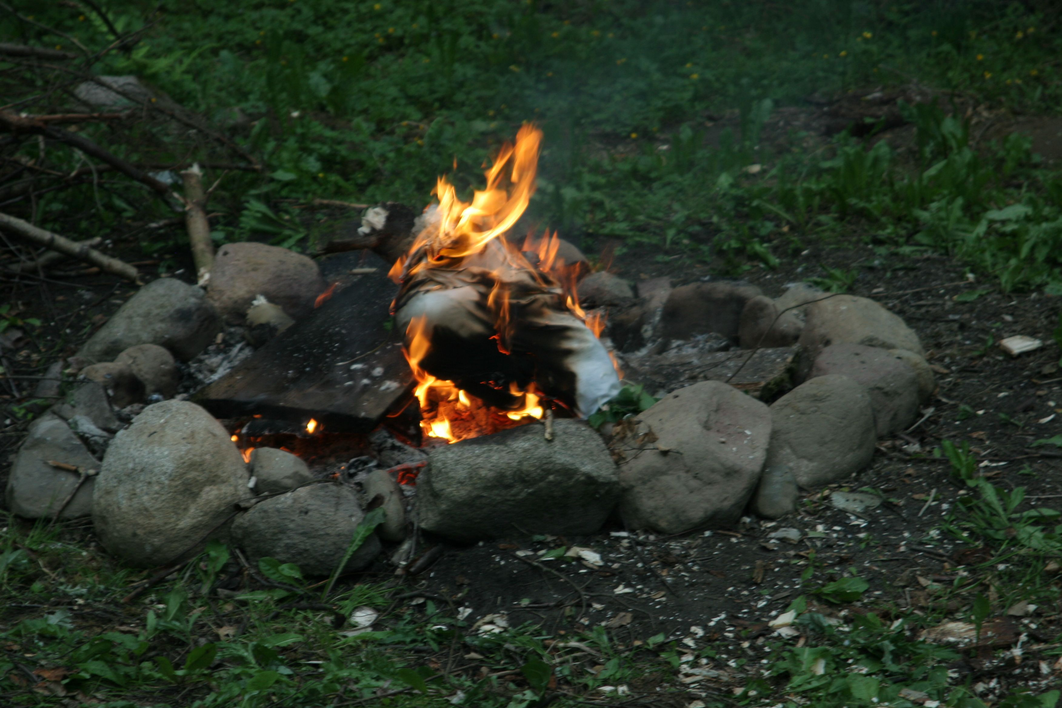 Ognisko